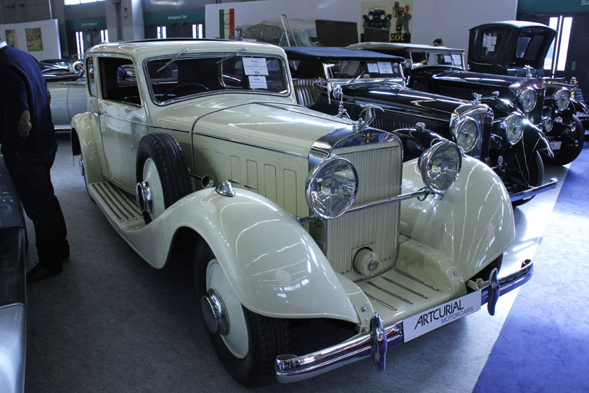 1934 Hispano Suiza K6 Coach Vanvooren